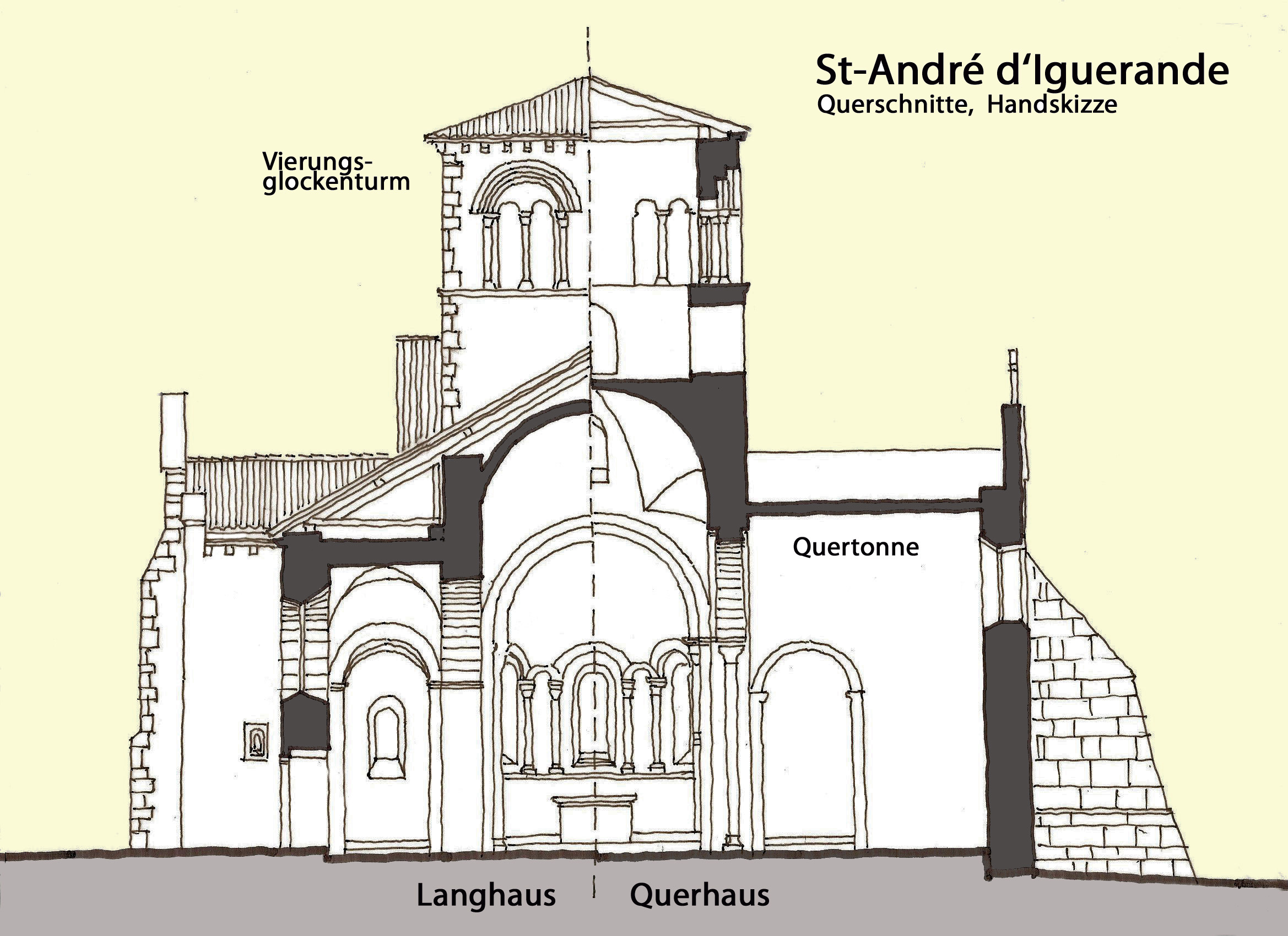 St-André_d'Iguerande.Querschnitte, Handskizze